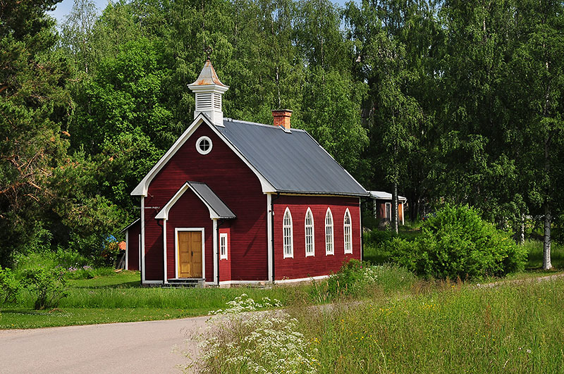 Fågelsjö f.d. pingstkyrka, numera privatbostad.